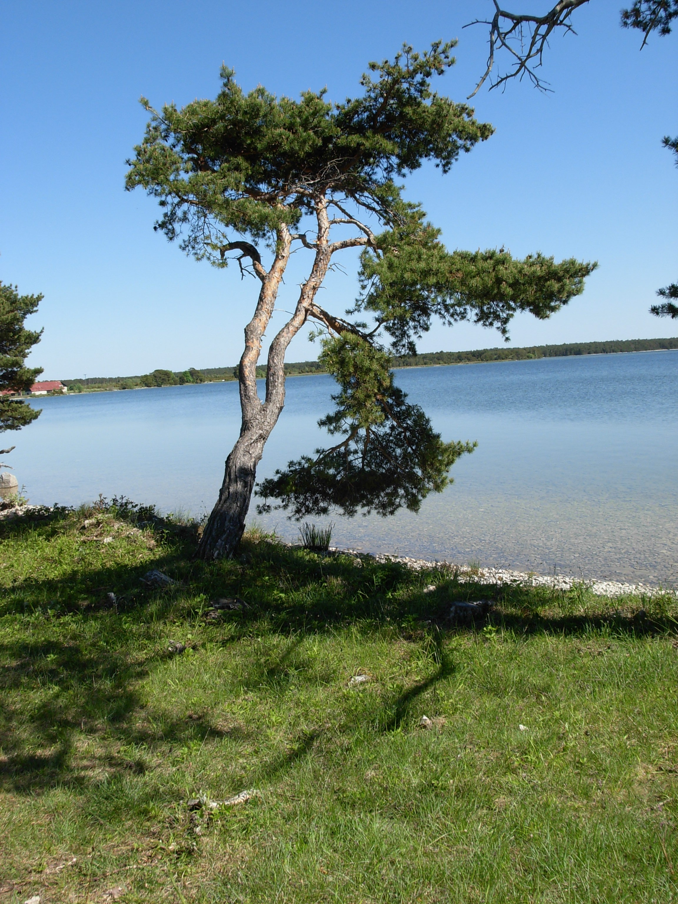 Bästeträsk är en stor sjö på norra Gotland